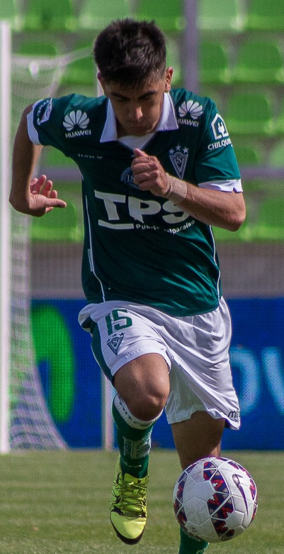 Fotografía del jugador de fútbol Manuel Bravo en el Santiago Wanderers.